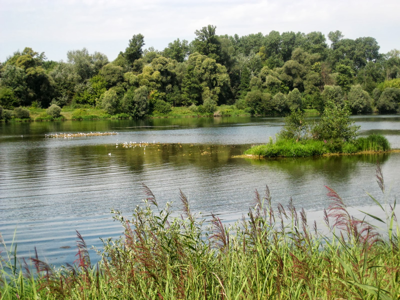 Vrijdag 23 augustus 2013. Near Kappel am Rhein, Germany